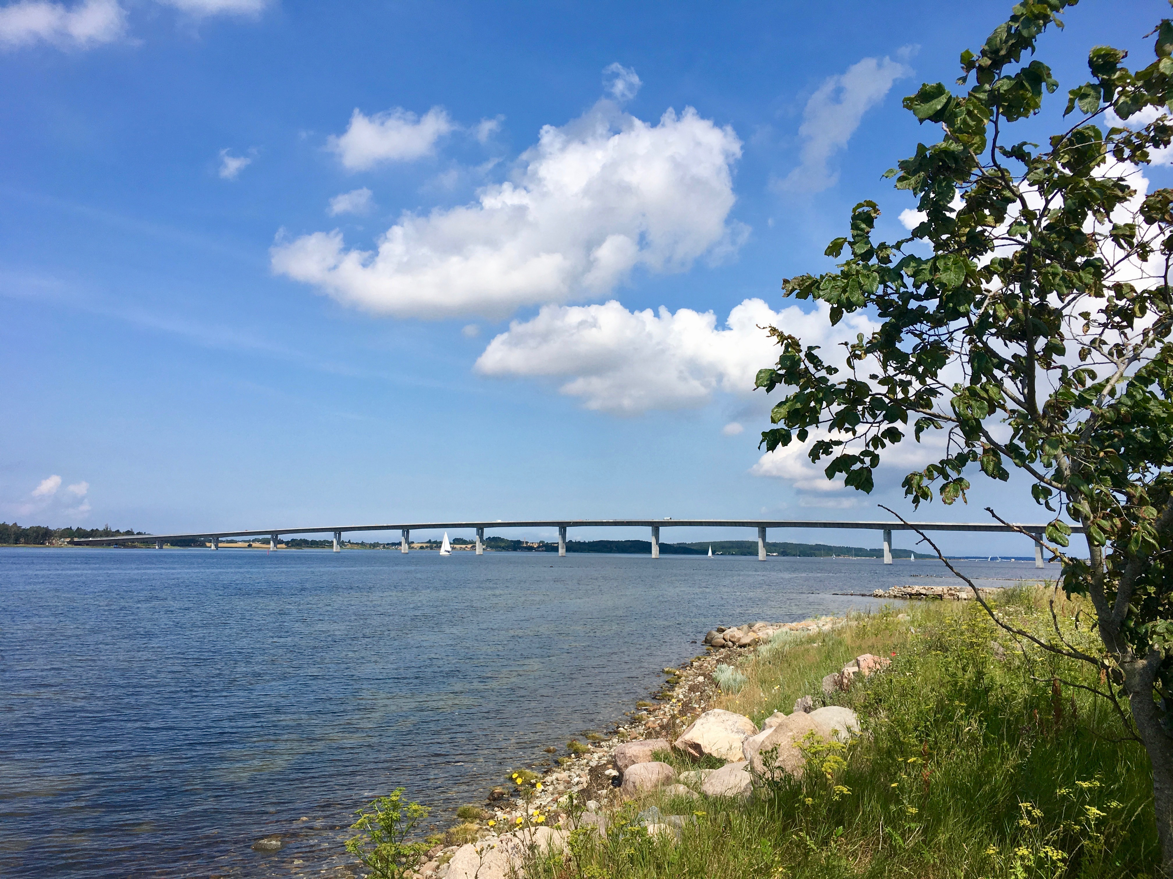 Kronprinsesse Marys Bro